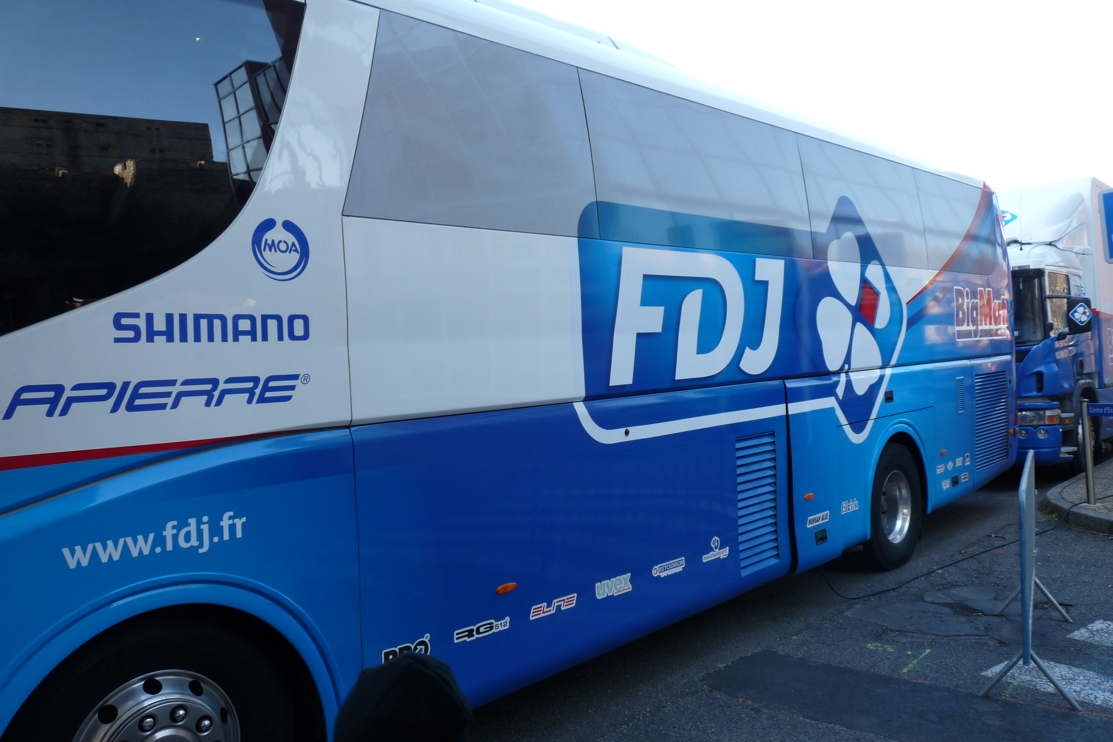 Bus de l'Équipe cycliste FDJ-BigMat lors de l'Étoile de Bessèges 2012